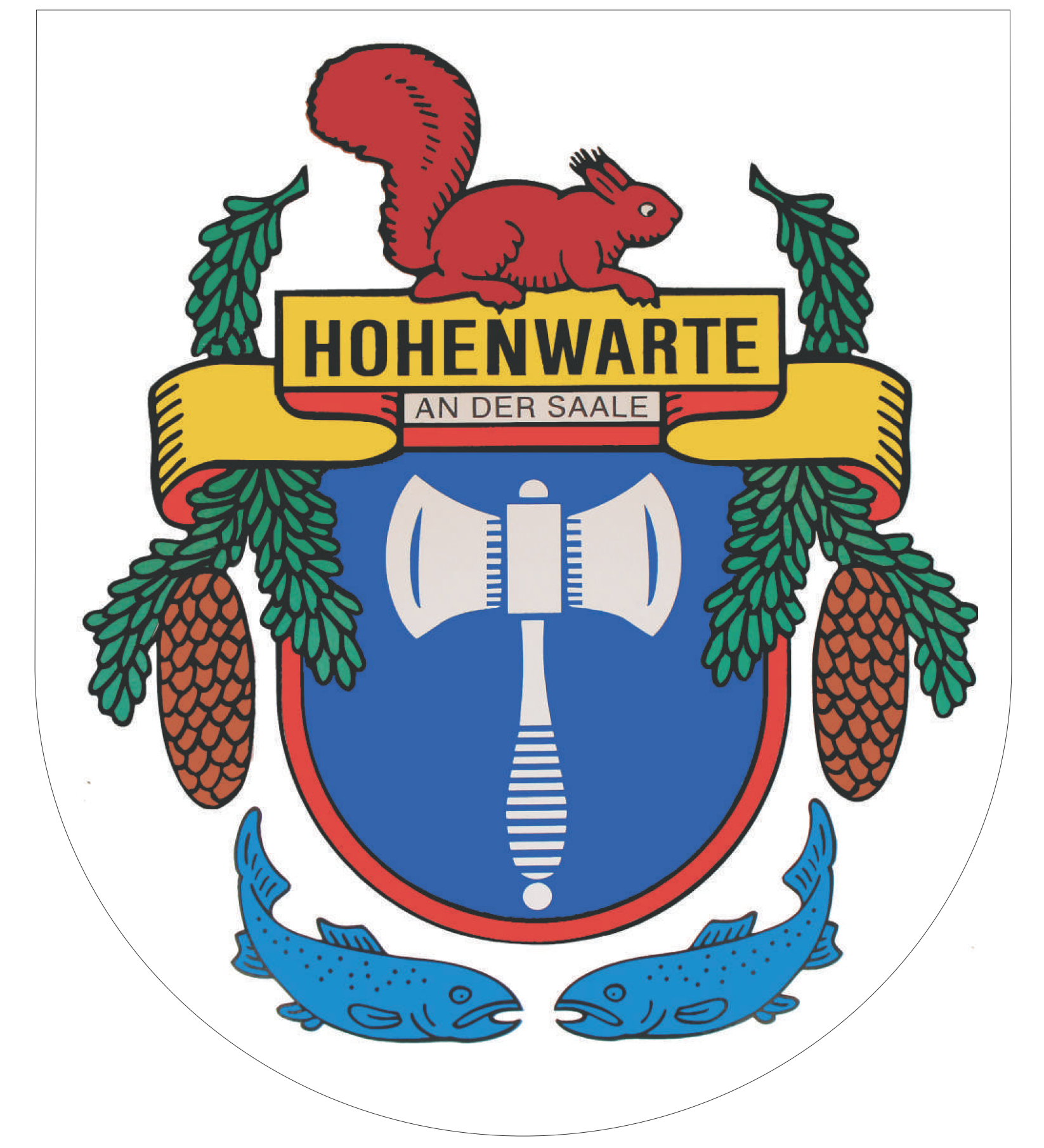 Wappen der Gemeinde Hohenwarte / Saale